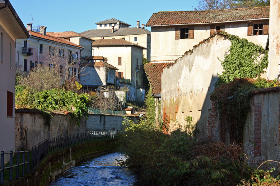 Veduta delle case di Suno (NO) lungo il Torrente Meja che attraversa l'abitato